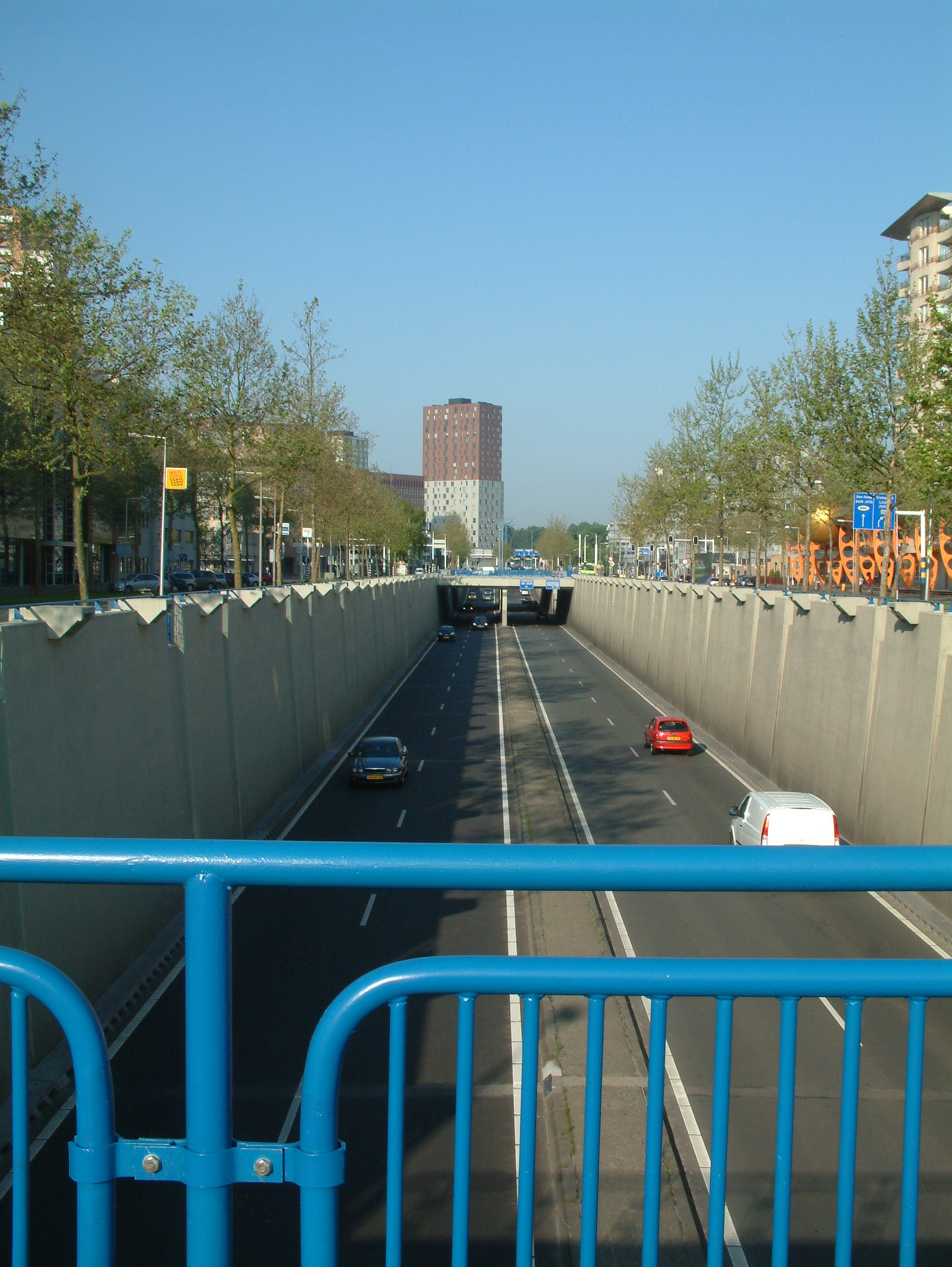 De tunnelbak, centraal in het hoofdwegenstelsel van Zoetermeer